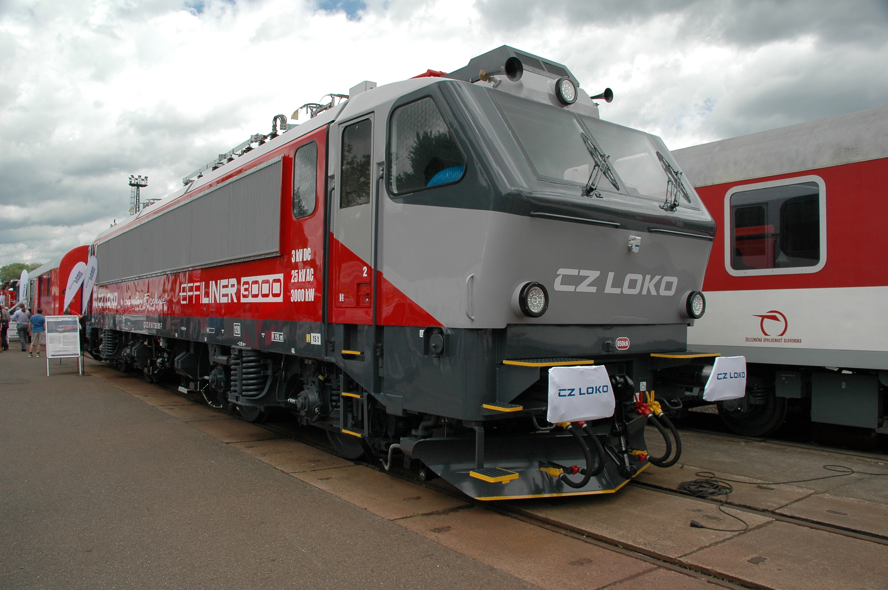 Původně zahraniční lokomotiva zrekonstruovaná v CZ LOKO